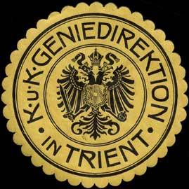 Sealing stamp Title: K.u.K. Geniedirektion in Trient Description: gelb, schwarz, geprägt Place: Trient size: 6 cm